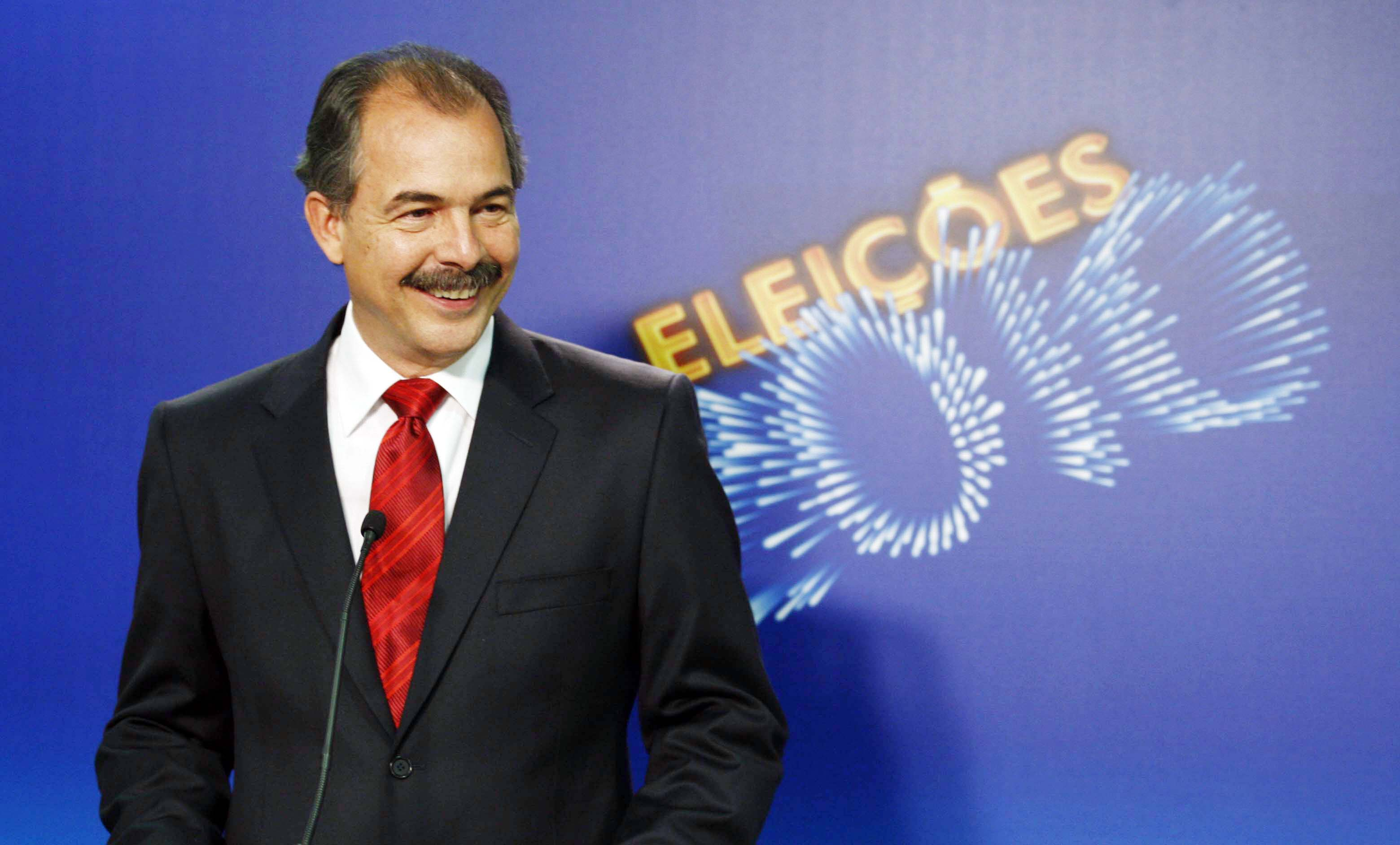 28.09.2010 - Mercadante participa do Debate TV Globo com os candidatos ao Governo de São Paulo. Foto: Cesar Ogata